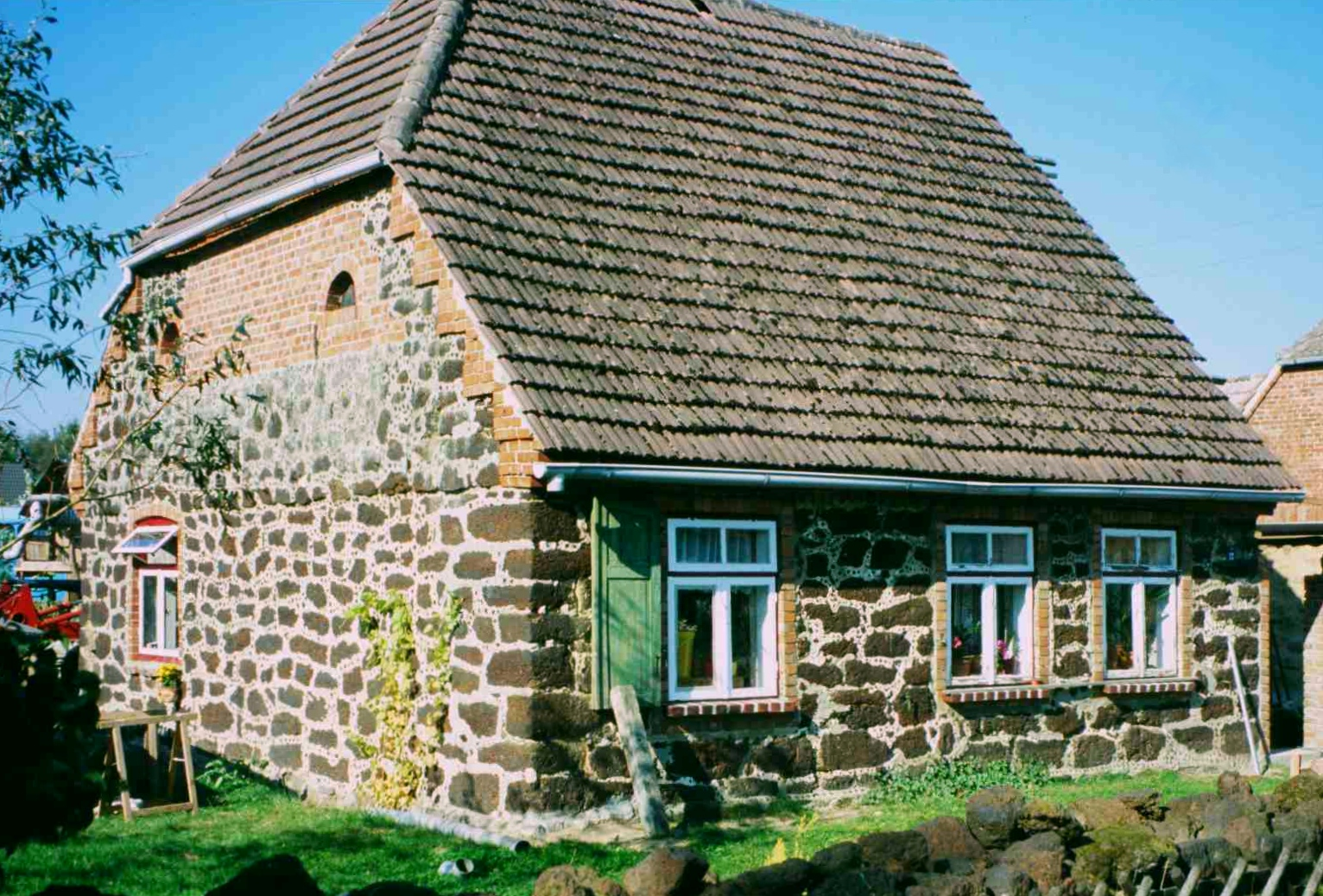 Haus aus Raseneisenstein erbaut, Bresegard bei Eldena, Mecklenburg-Vorpommern, Deutschland